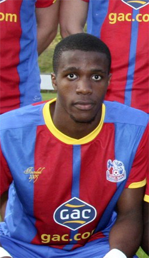 Уилфрид Заха